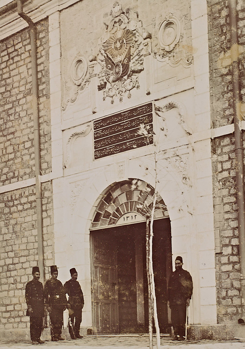 Darülaceze'nin kapısı